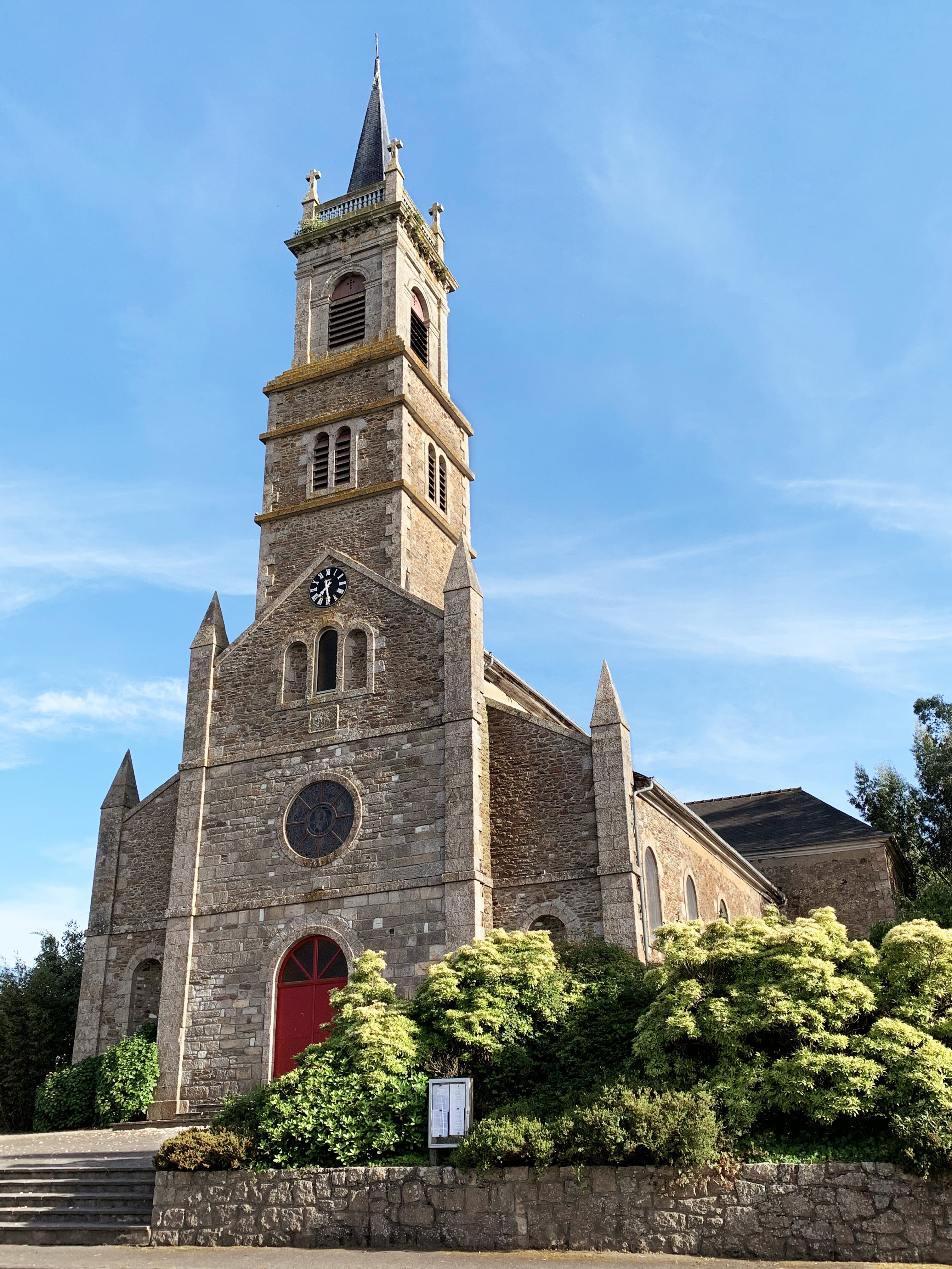 Église Saint-Jacques de Languenan dans les Côtes d'Armor.